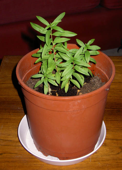 Heimia sp.